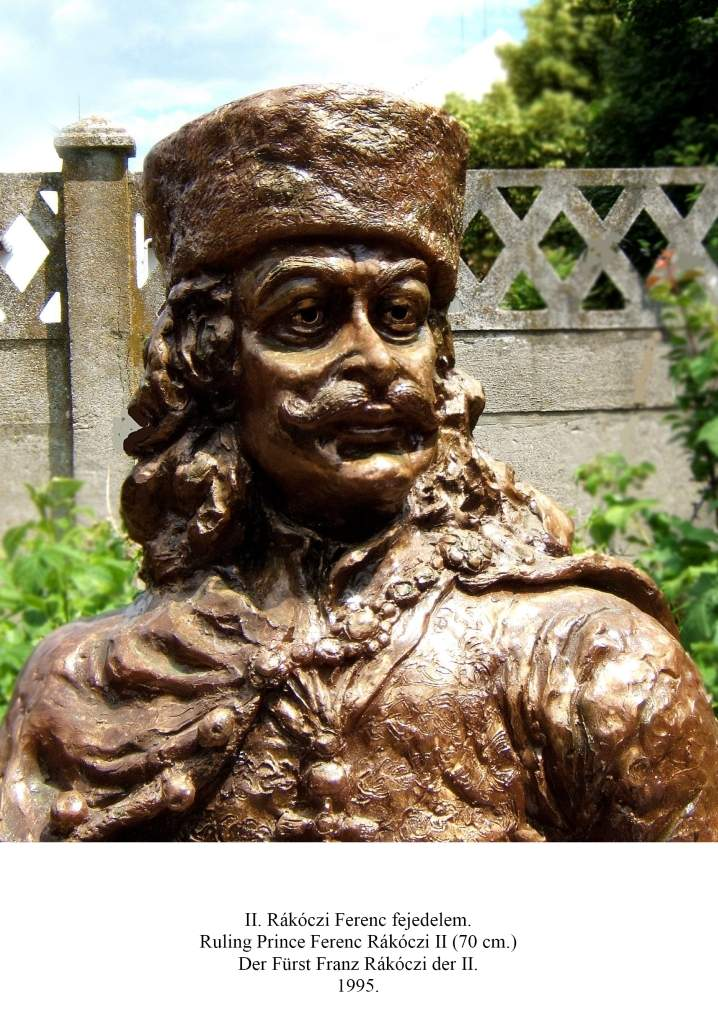 II. Rákóczi Ferenc, Csíky László szobra, magasság: 70 cm